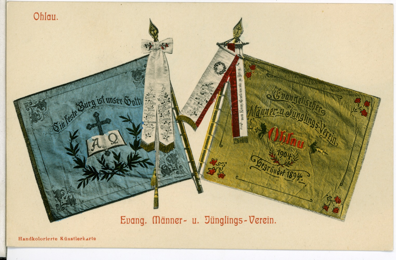 Ohlau; Evangelischer Männer und Jünglingsverein - Fahnen This postcard is from publisher Brück & Sohn in Meißen ( postcard has a unique number 09826 and is available in a higher resolution at the publisher. This images was uploaded in a cooperation project between Wikipedians and the publisher.